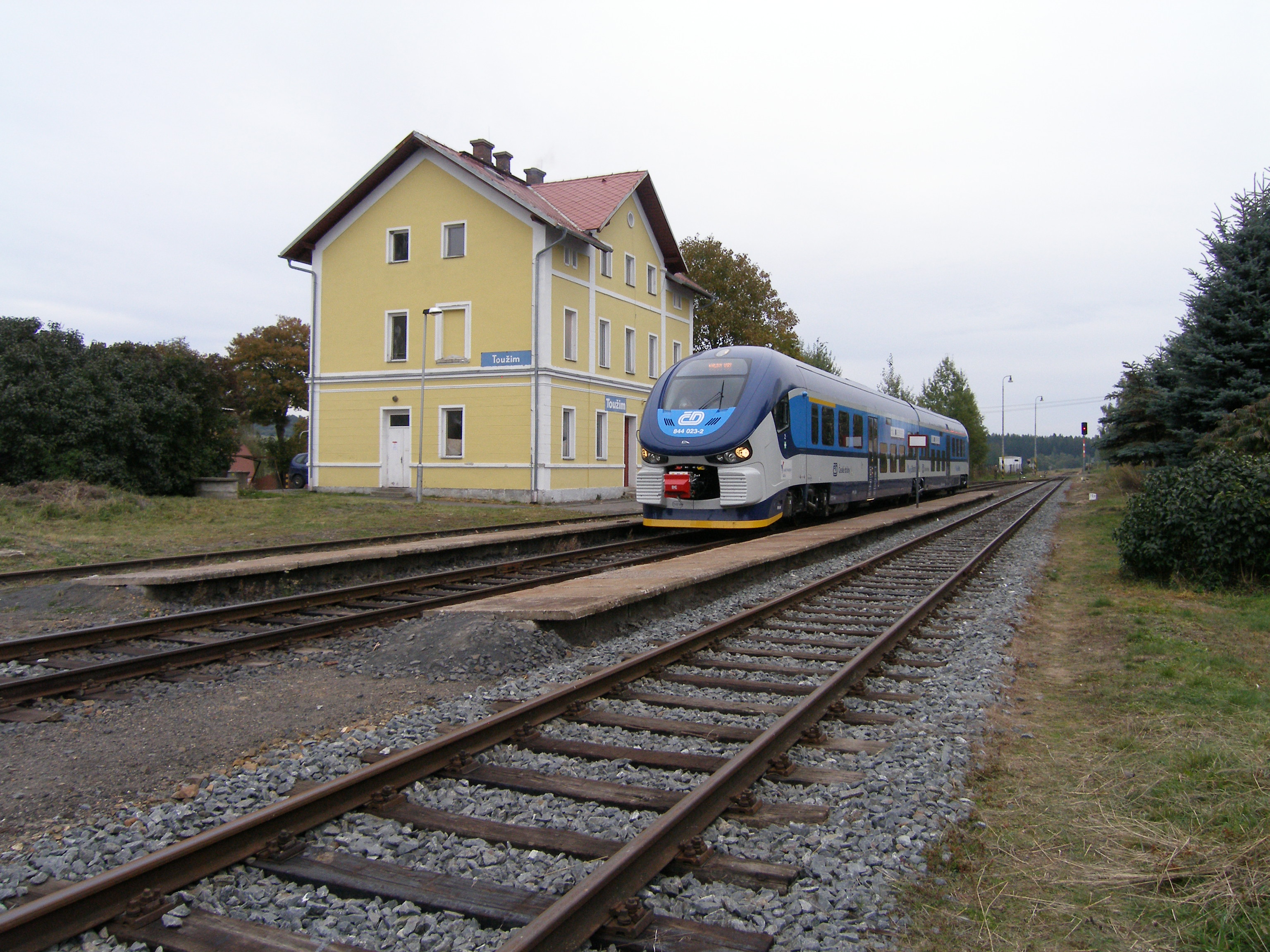 Toužim, železniční stanice při oslavách 115 let železniční trati Rakovník-Bečov nad Teplou s mimořádným motorovým osobním vlakem s motorovým vozem ČD RegioShark 844.023-2.